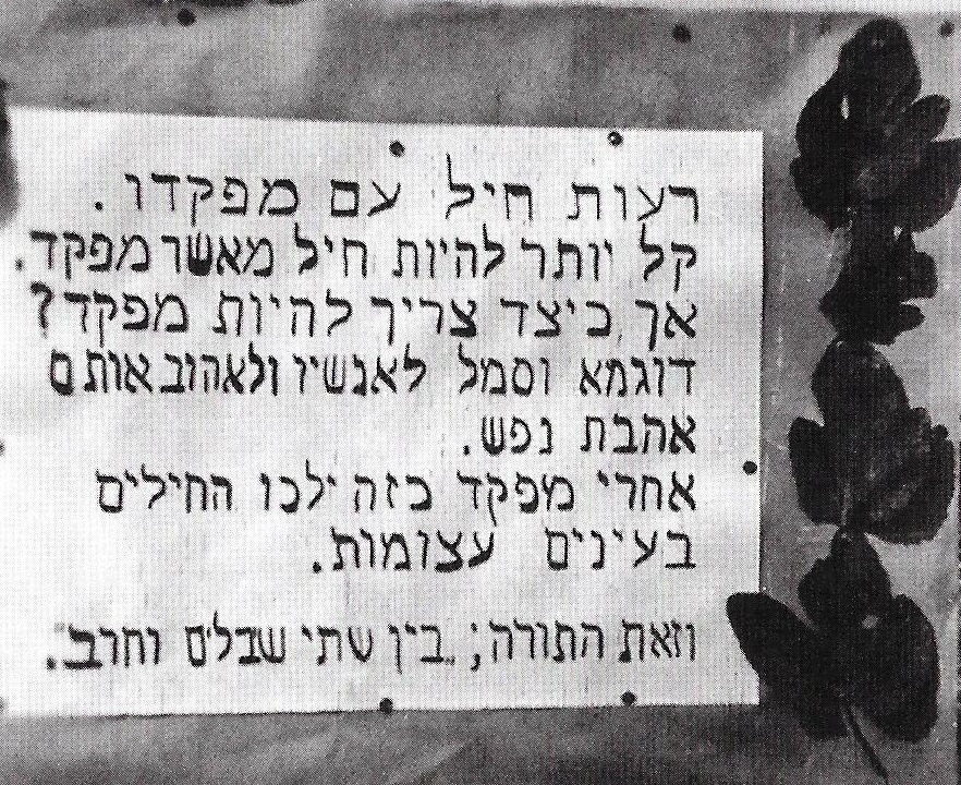 שלט סגנון המנהיגות המחייב שקבע יוחאי בן נון בבסיס שייטת 13 ונשאר מחייב גם בתקופת פיקודו של שפיר